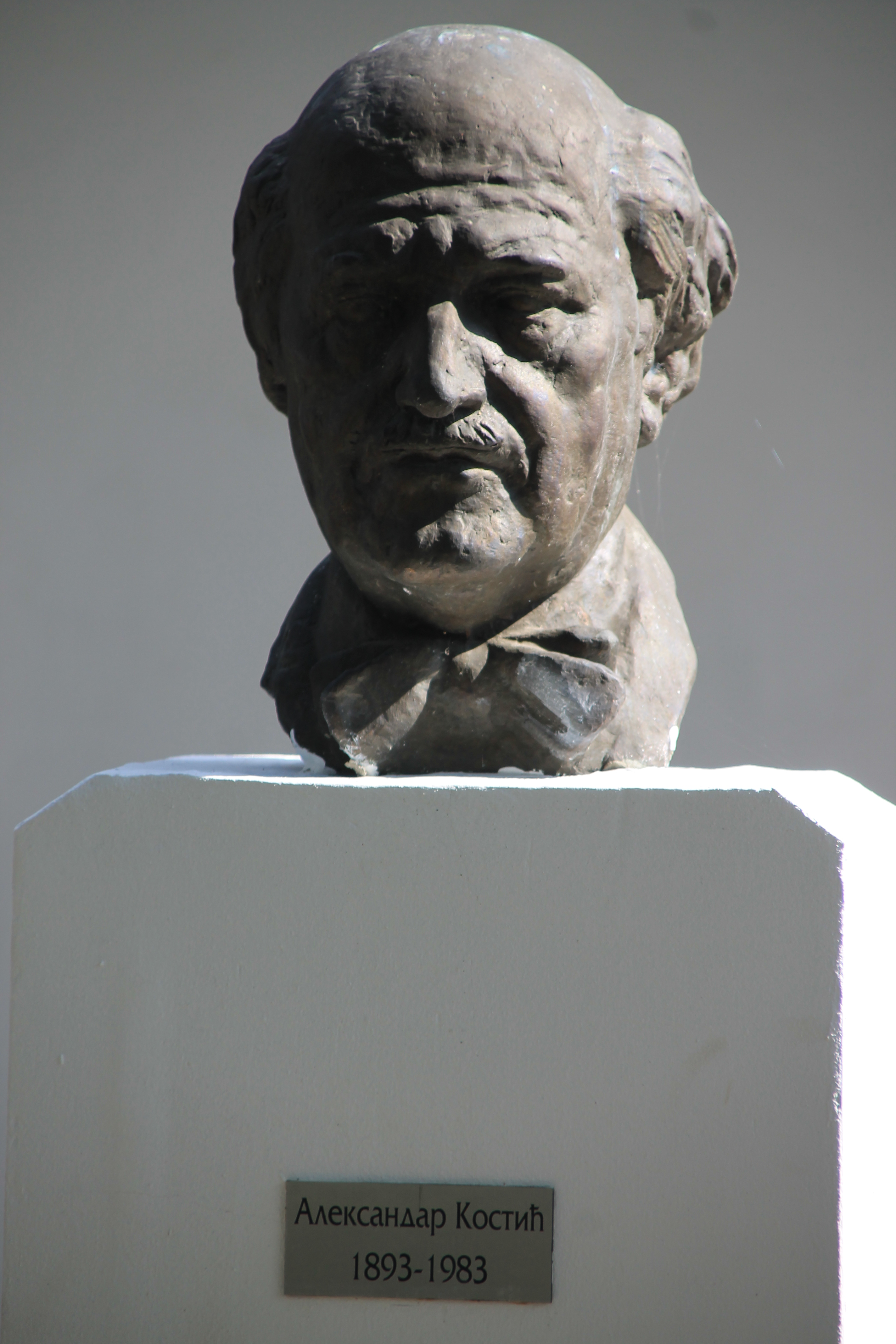 Rančićeva kuća u Grockoj